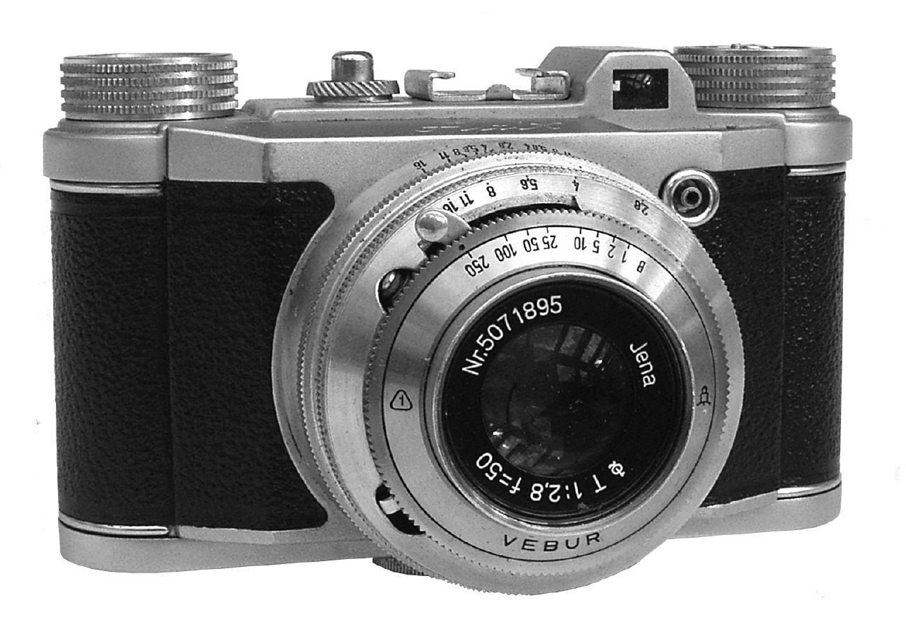 Die Altix IV, eine wirkliche „Kompakte“ der Fünfziger. Kurze Geschichte: 1939 Entwicklung der Altix I noch von der „Eho“-Kamera-Fabrik in Dresden, dann Zwang zur Rüstungsgüter-Produktion. 1941 Umbenennung in „Altissa-Camera-Werk Berthold Altmann“, 1945 zerbombt, 1946 Neuanfang. 1952 Verstaatlichung, ab 1953 „VEB Altissa-Camera-Werk“. 1952 Einführung der „Altix IV“, es folgten die Modelle „Altix V“ und „n“ und „nb“ mit Wechselobjektiven. 1959 Eingliederung in den „VEB Kamera- und Kinowerke Dresden“, und so endet dann der Name „Altissa“. Die „Altix IV“ gab es in zahlreichen Variationen, sie unterschieden sich in Objektiv, Schriftzug, Sucher usw. Der Film wird übrigens über den Kamera-Boden eingelegt, die Rückwand lässt sich teilweise (über dem Filmfenster) aufklappen. Meine hat den Schriftzug „Altix“ in Schreibschrift, einen Vebur-Verschluss und ein „Jena 1:2,8/50 mm“ („Carl Zeiss“ war wegen Rechtsstreitigkeiten mit den West-Zeiss-Werken verboten).